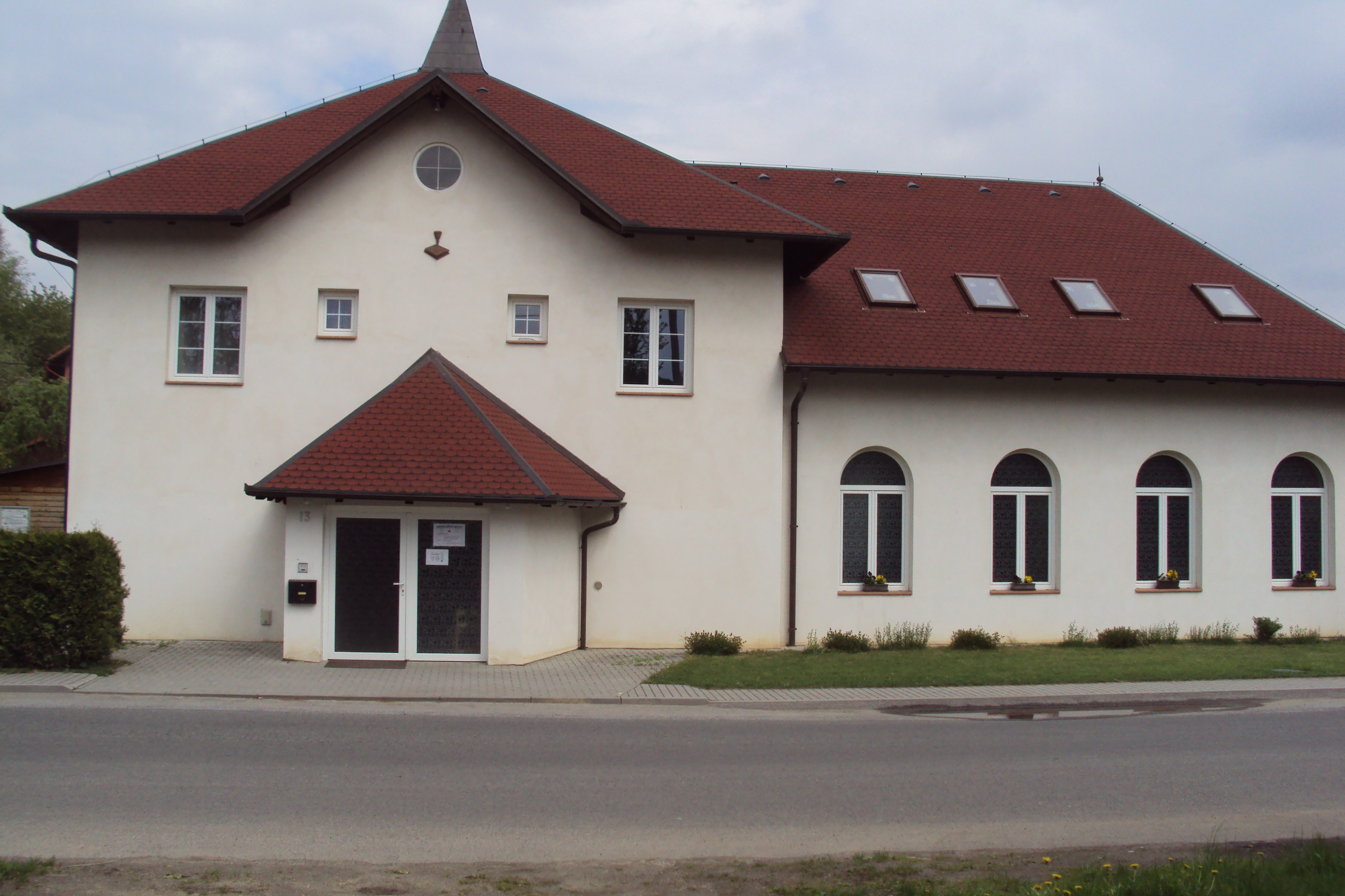 Sborový dům Oaza baptistů v Brništi